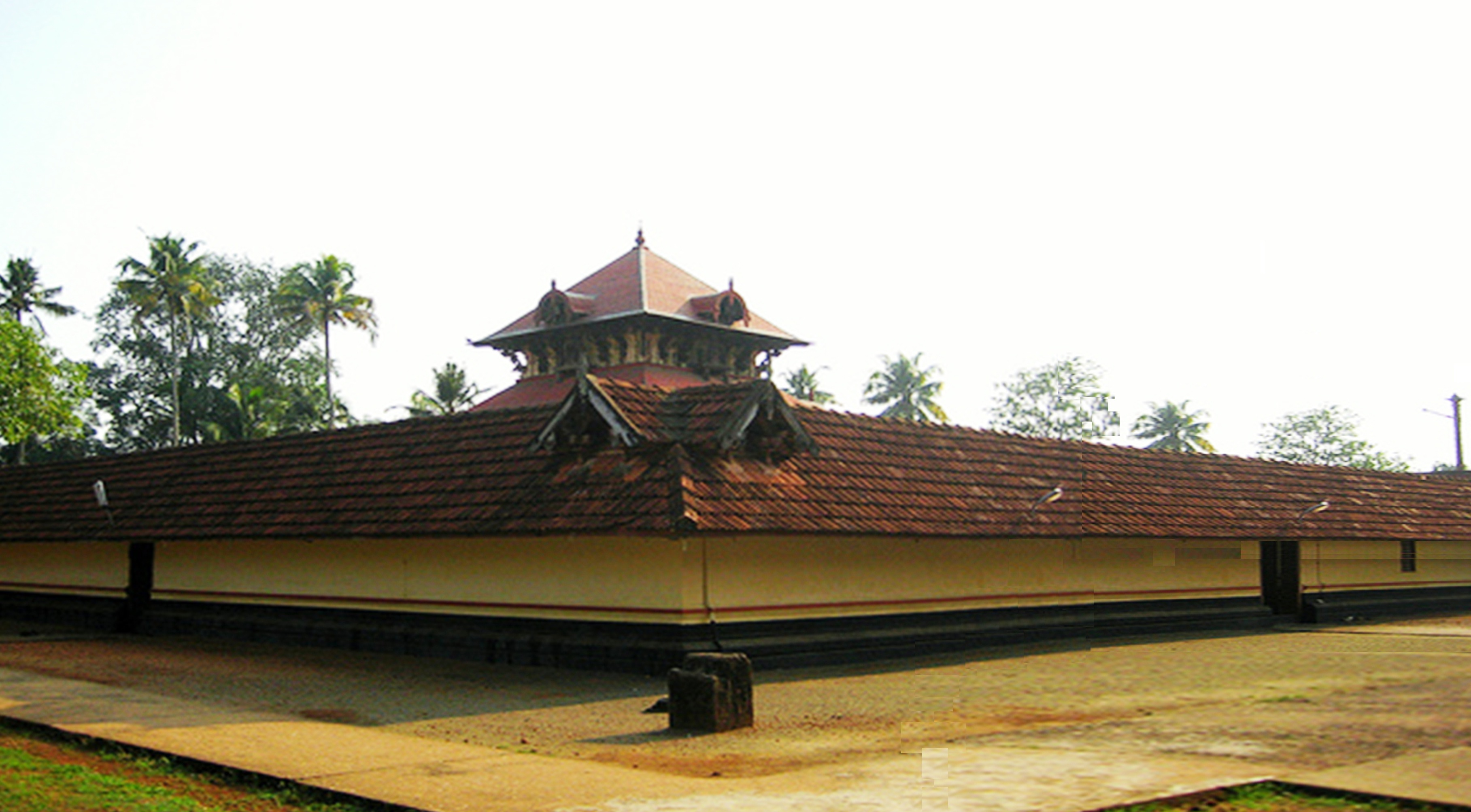 കടുത്തുരുത്തി തളി മഹാദേവക്ഷേത്രം